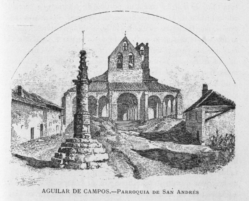 Aguilar de Campos. Parroquia de San Andrés.